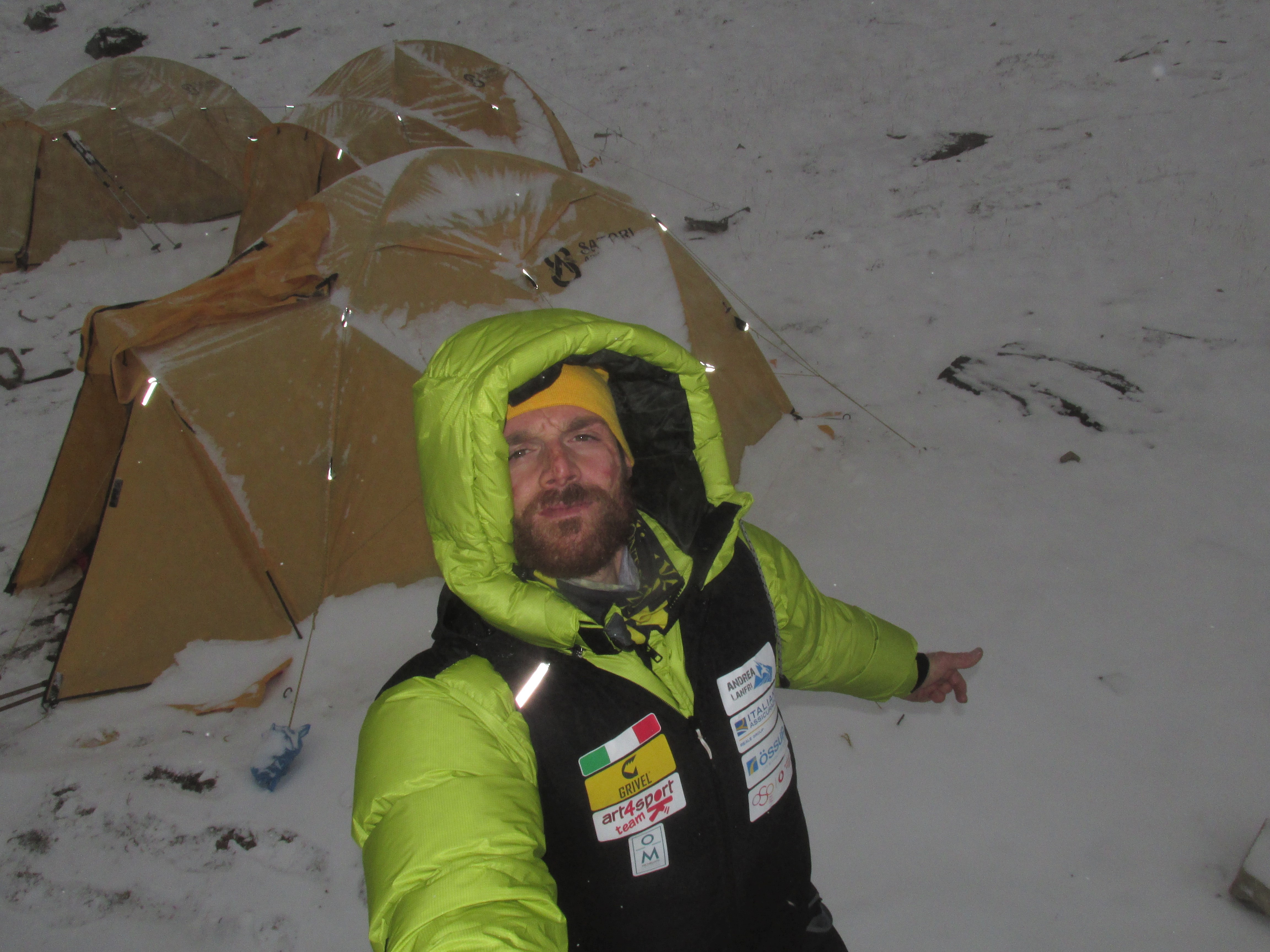 Andrea al Campo Base quota 4900